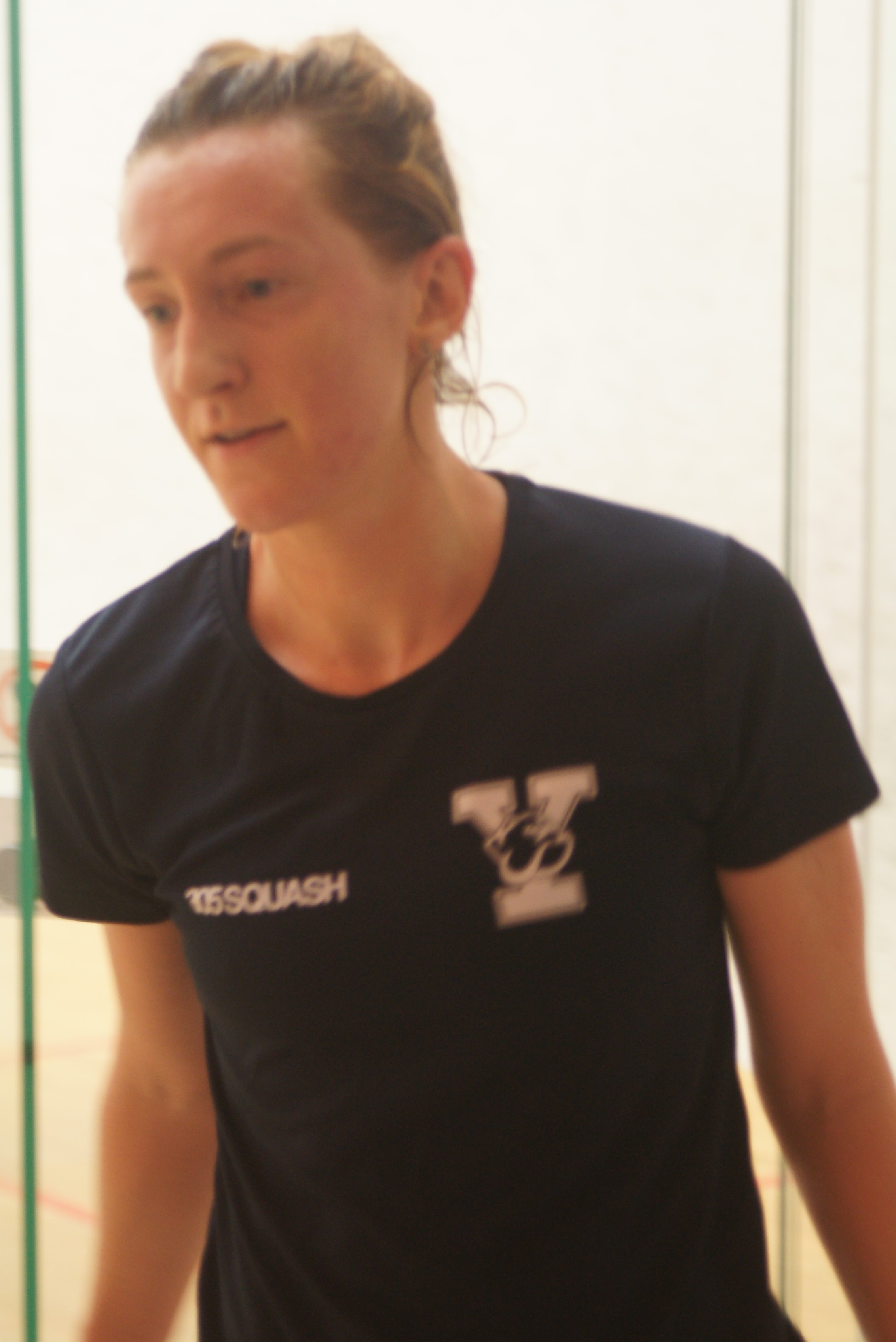 Millie Tomlinson, Monaco Squash classic 2016